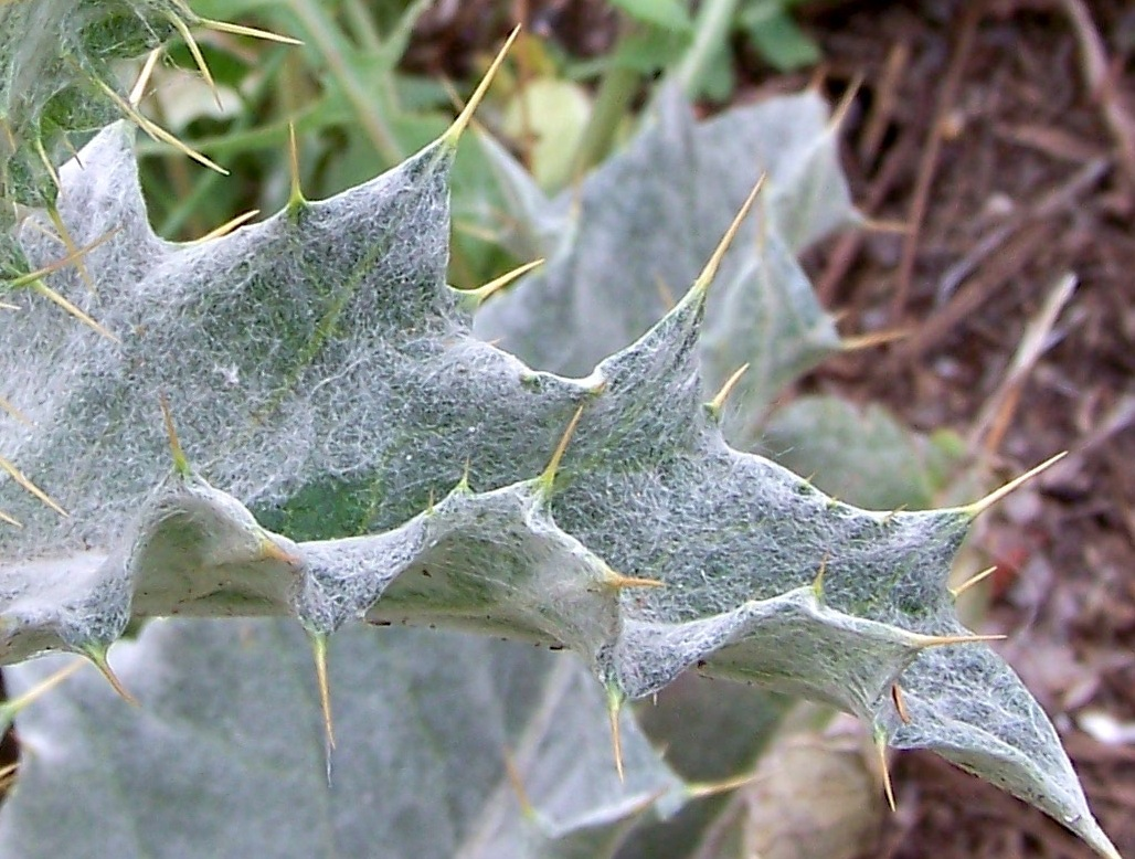 Onopordum acanthium var. schultesii - Vista de detalle de una hoja densamente aracnosa-tomentosa. - Parque del Planetario, Madrid (España).